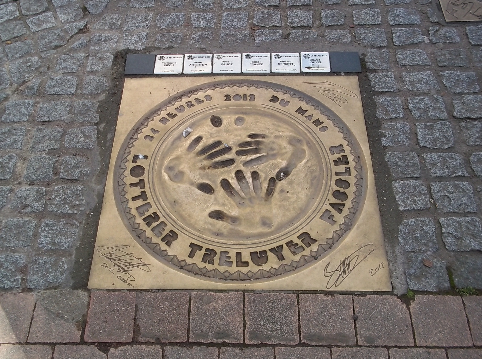 Plaque de bronze des empreintes des vainqueurs des 24 heures 2012